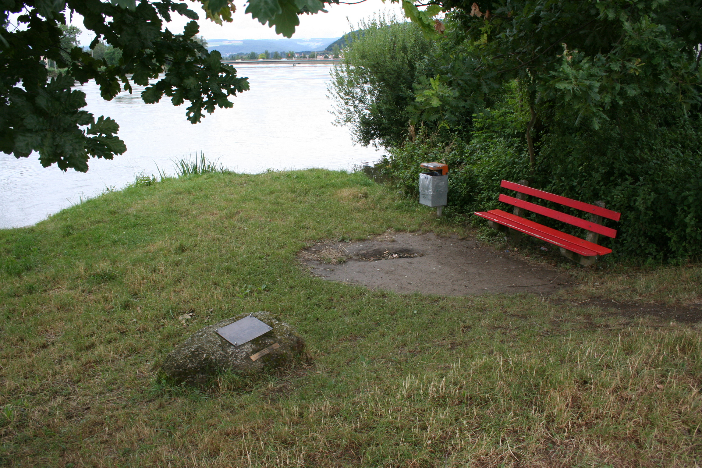 Denkmal Die Schweizerischen Scharfschützen in Döttingen Zum Gedenken An die Schlacht zwischen Oesterreichern und Franzosen im August 1799